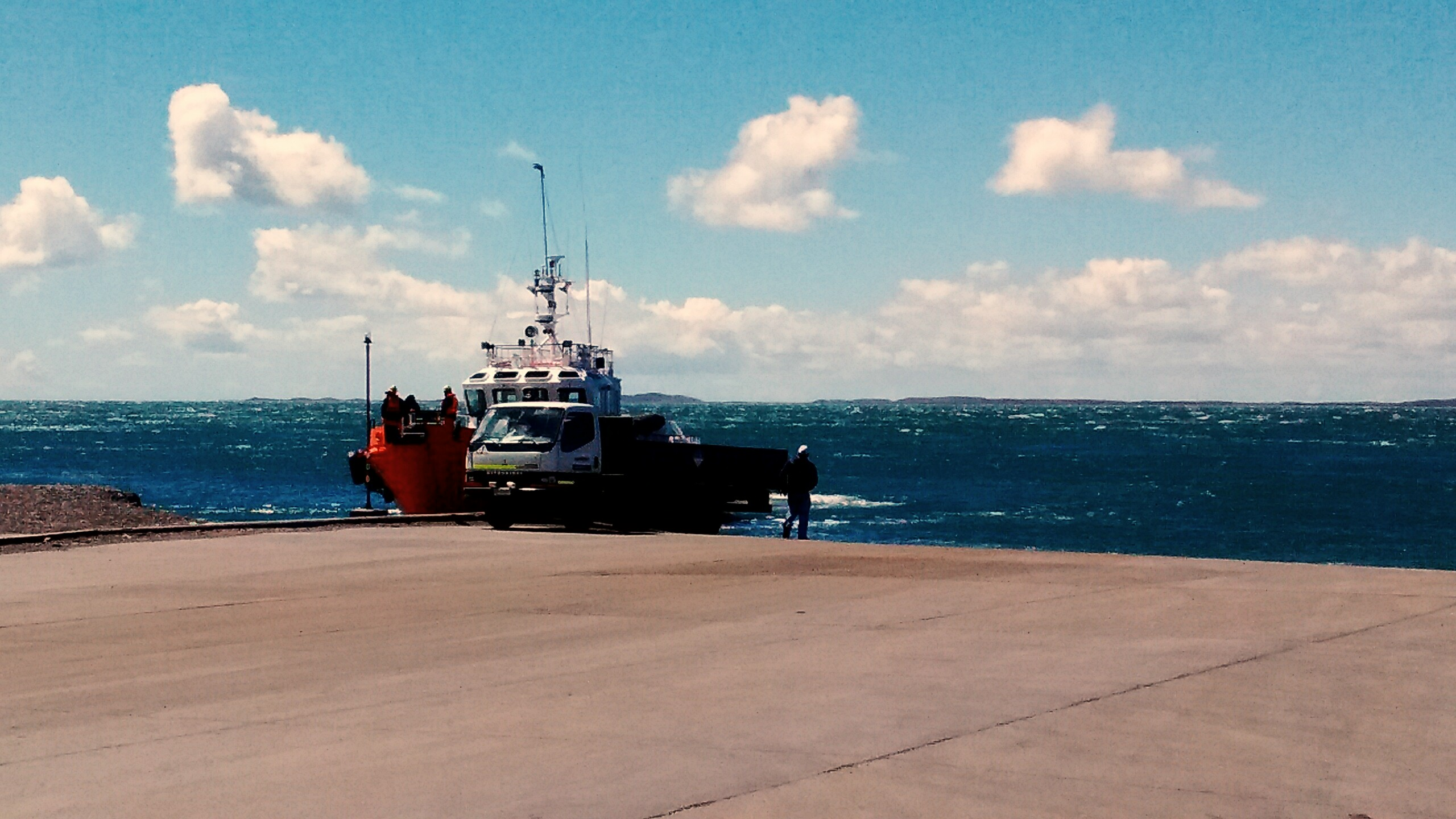 Estrecho de magallanes en su angostura próxima a Cerro Sombrero